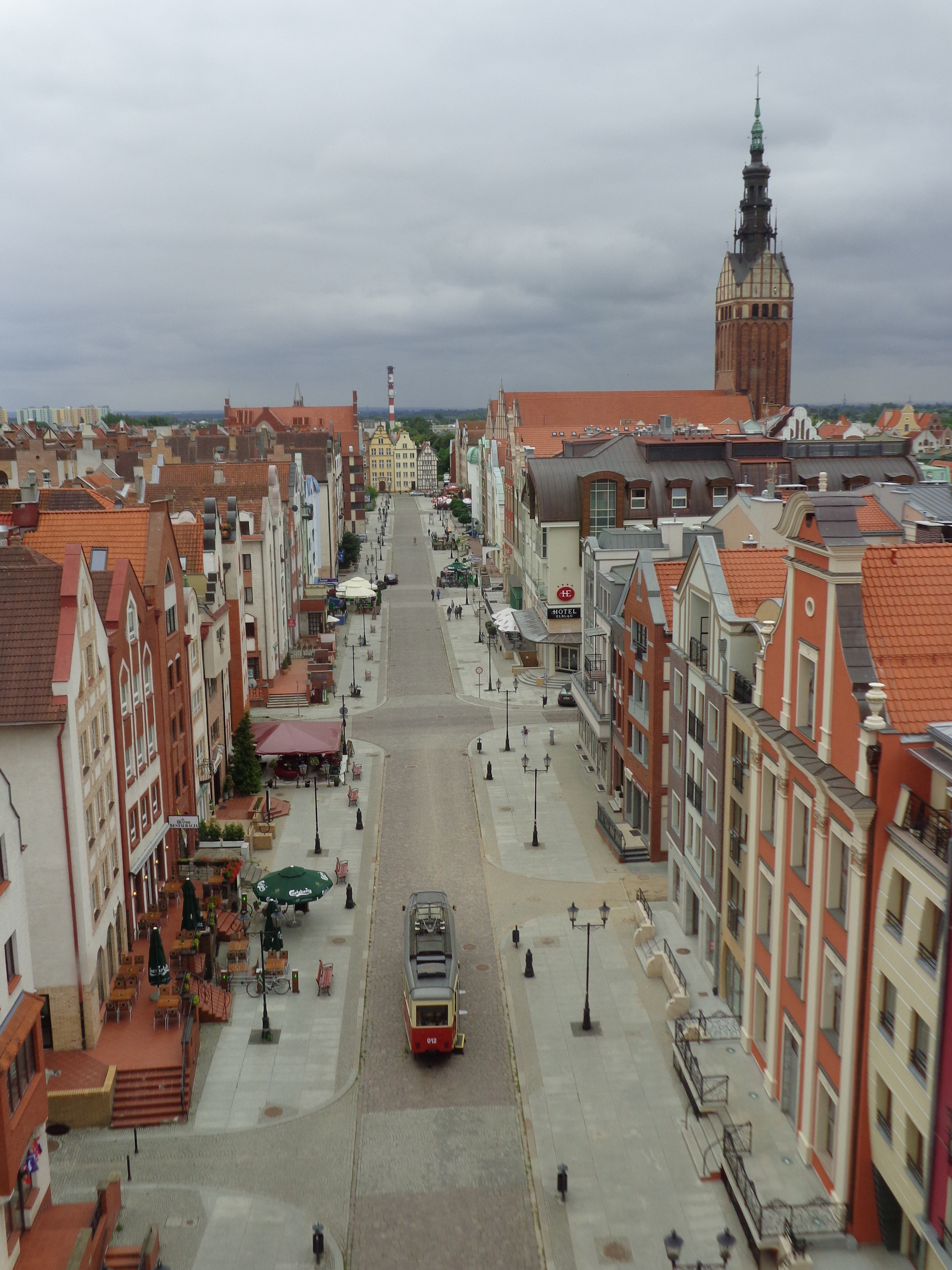 Elbląg - układ urbanistyczny Starego Miasta, widok z Bramy Targowej (zabytek nr A-514)